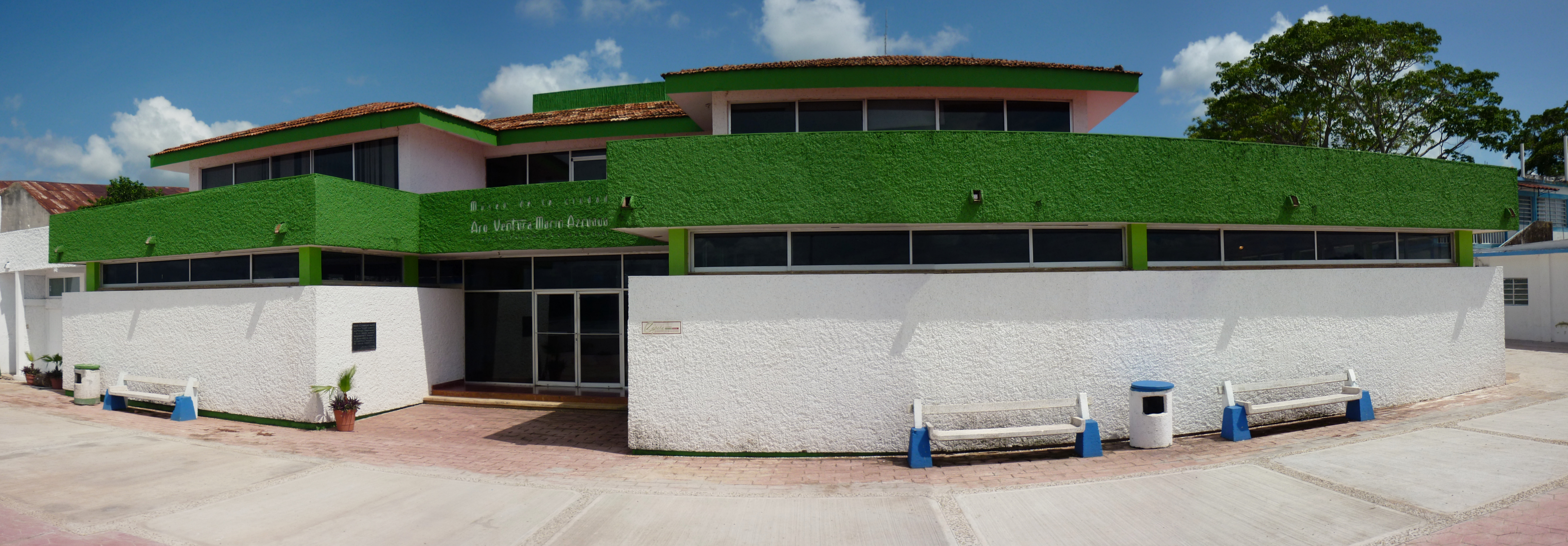 Ciudad de Emiliano Zapata, Tabasco